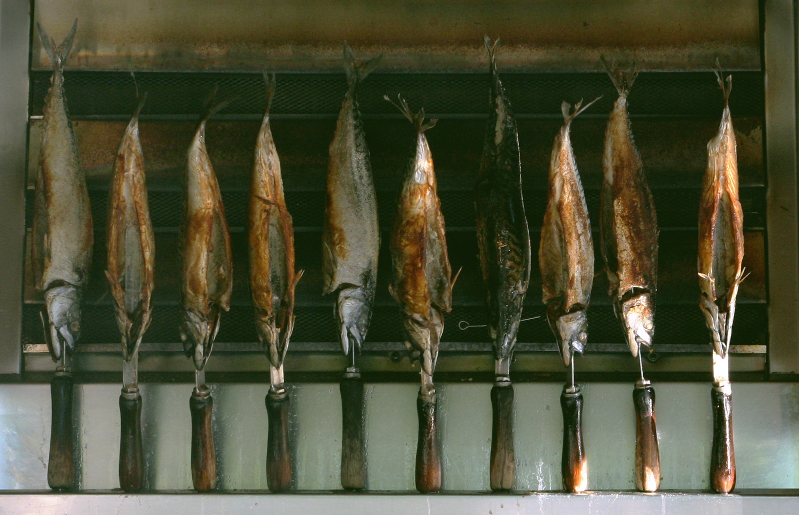 Makrele als Steckerlfisch im Ofen.